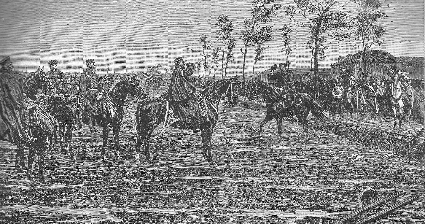 Monseigneur, j’ai l’ordre de vousrendre la garde impèrial.